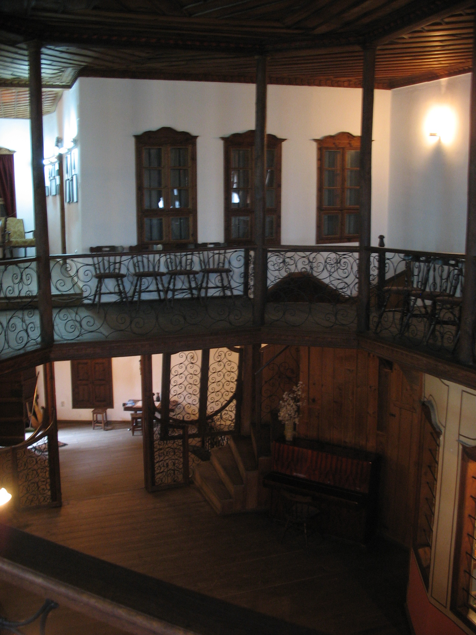 Sarafkinahuis - Veliko Tarnovo